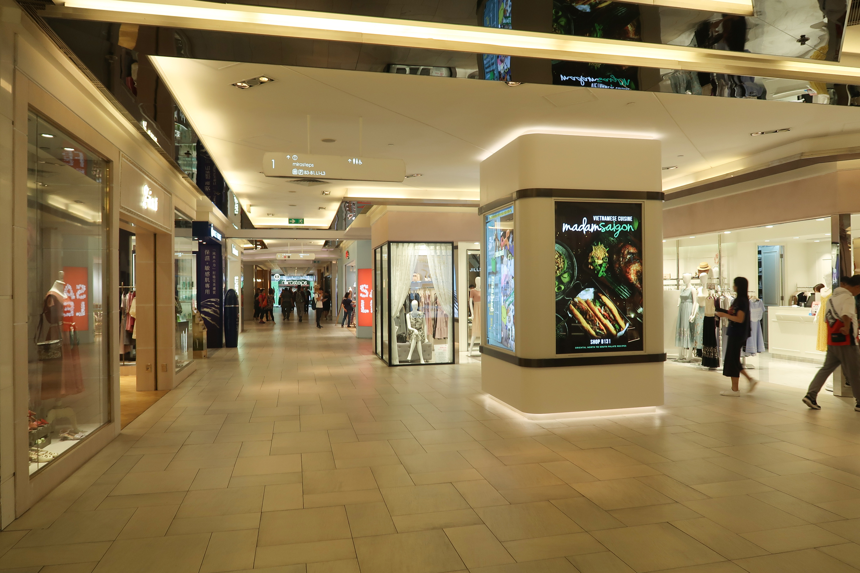 Mira Place Level 1